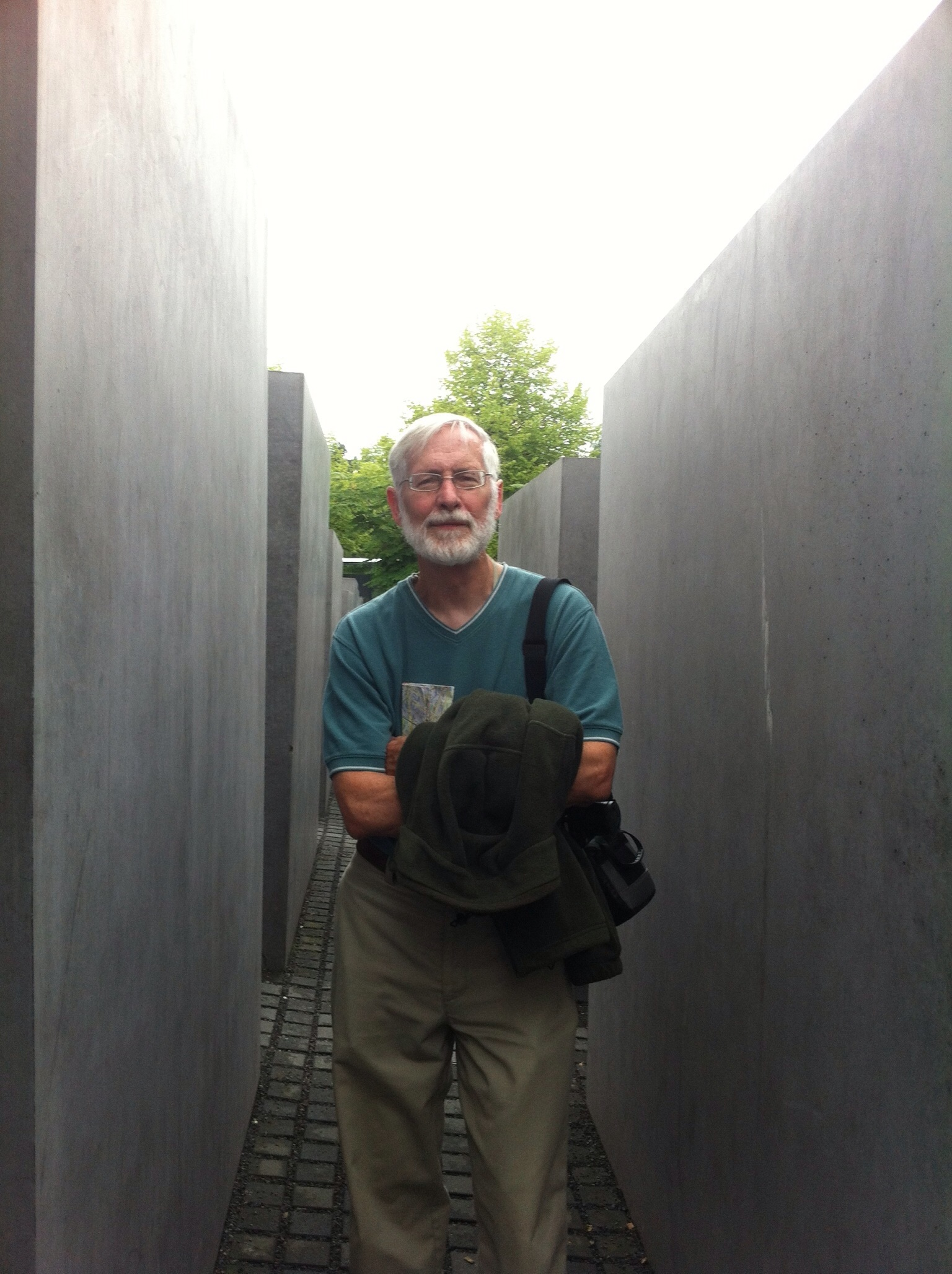 Charles C. Finn (Berlin, 2012)